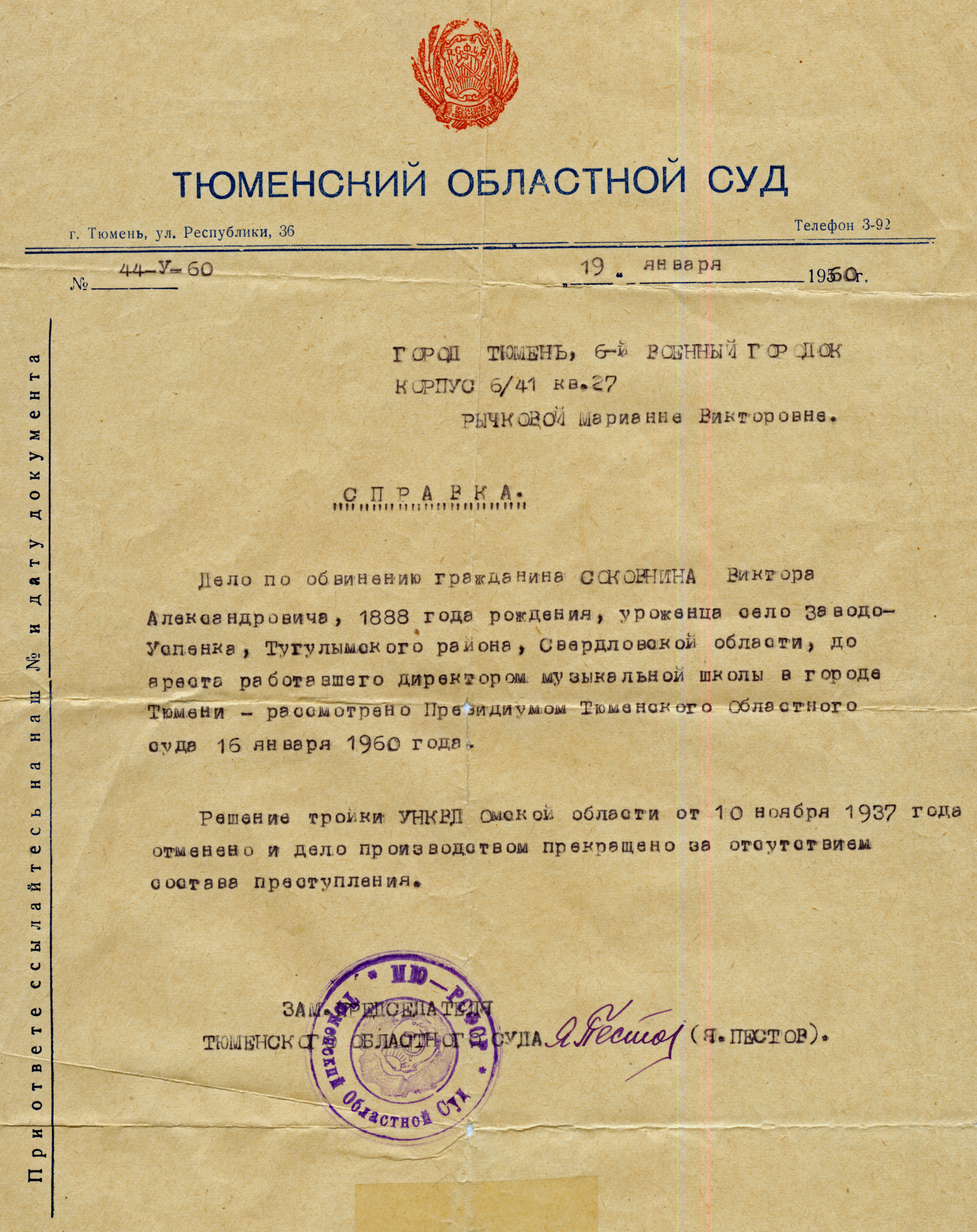 Справка о реабилитации В.А. Соковнина